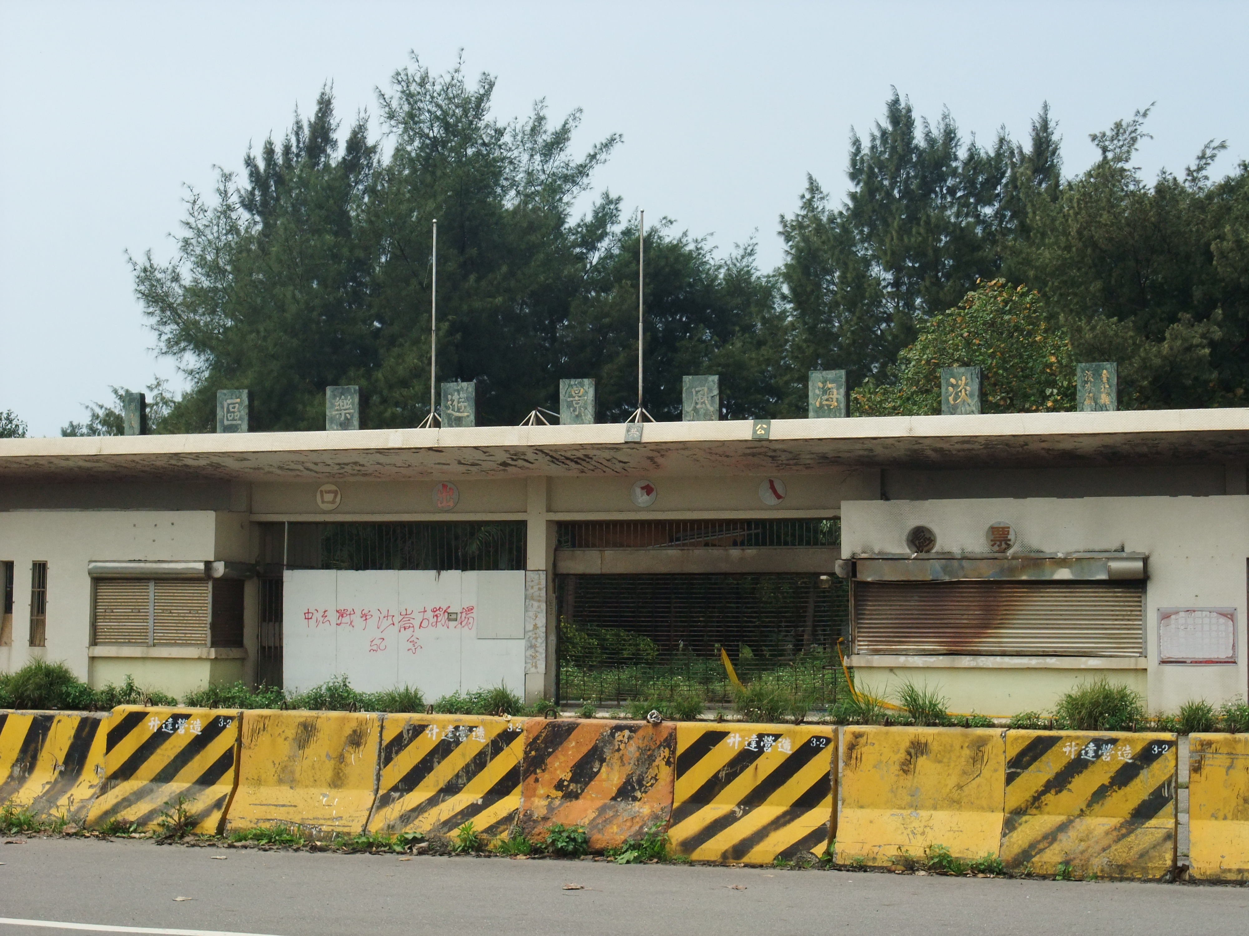 中文（台灣）: 沙崙海水浴場大門